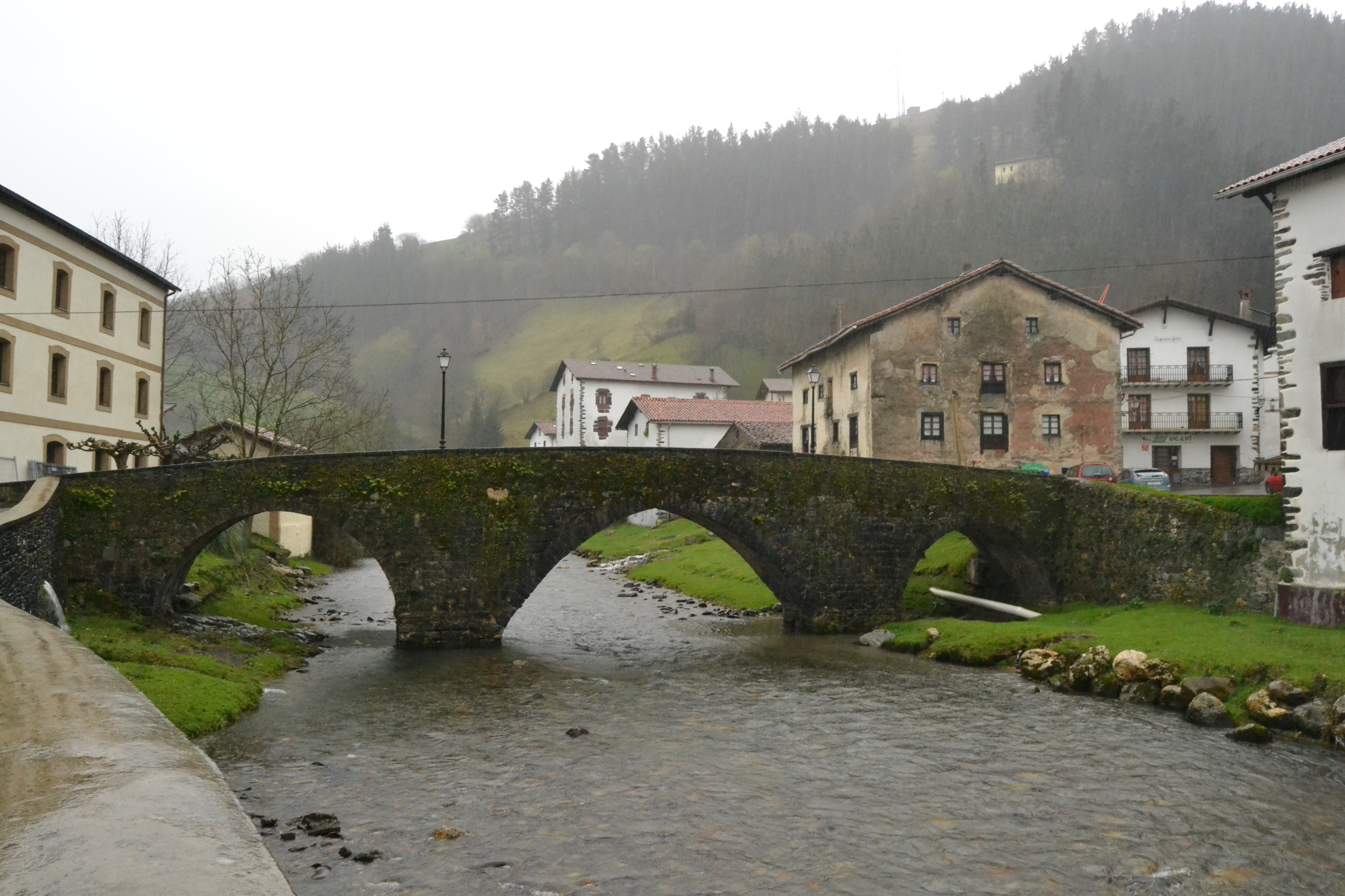 Goizuetako zubia. Nafarroa, Euskal Herria. The bridge of Goizueta. Navarre, Basque Country.